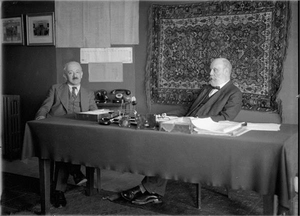 ירושלים - מר אוסישקין וד"ר אלכסנדר גולדשטיין בלשכה הראשית של הקק"ל.